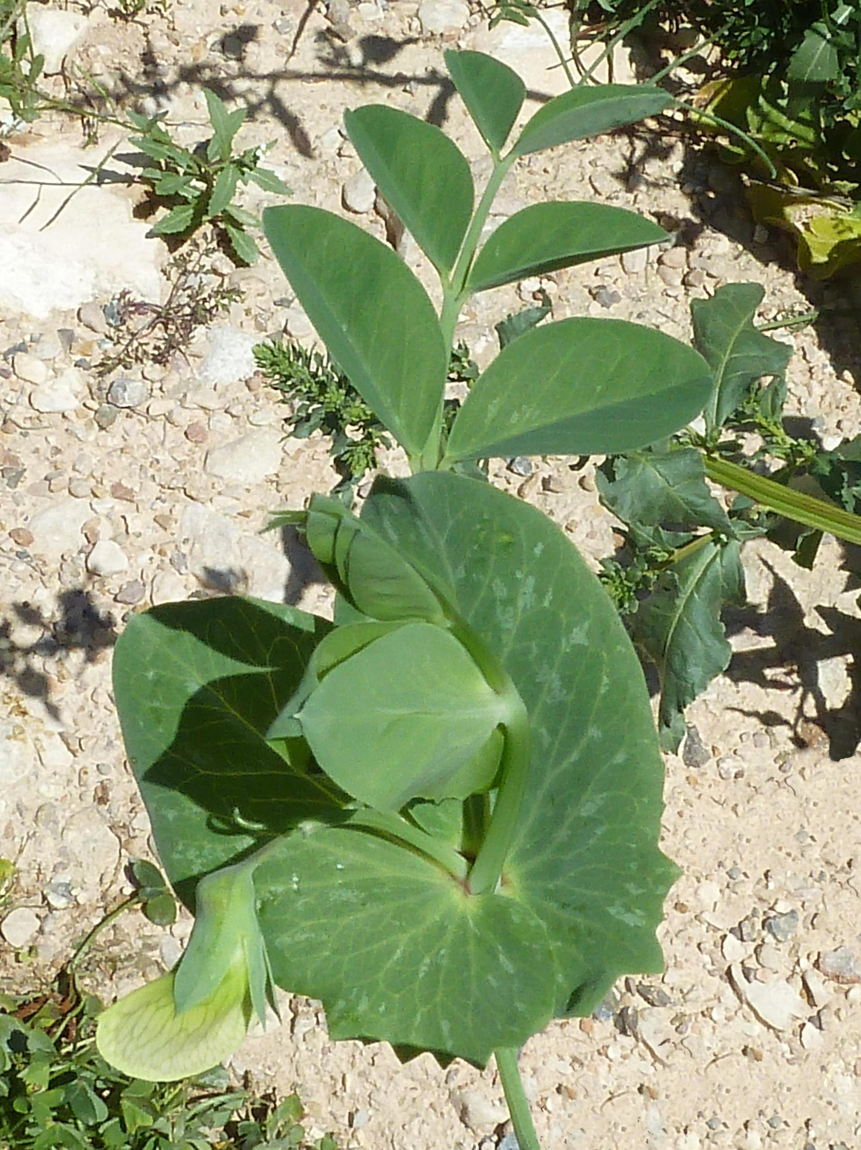 Pisum sativum (Guisante) : Estipula con hoja y flor en pre antesis - Avenida de la Libertad, Albatera (Alicante, España).